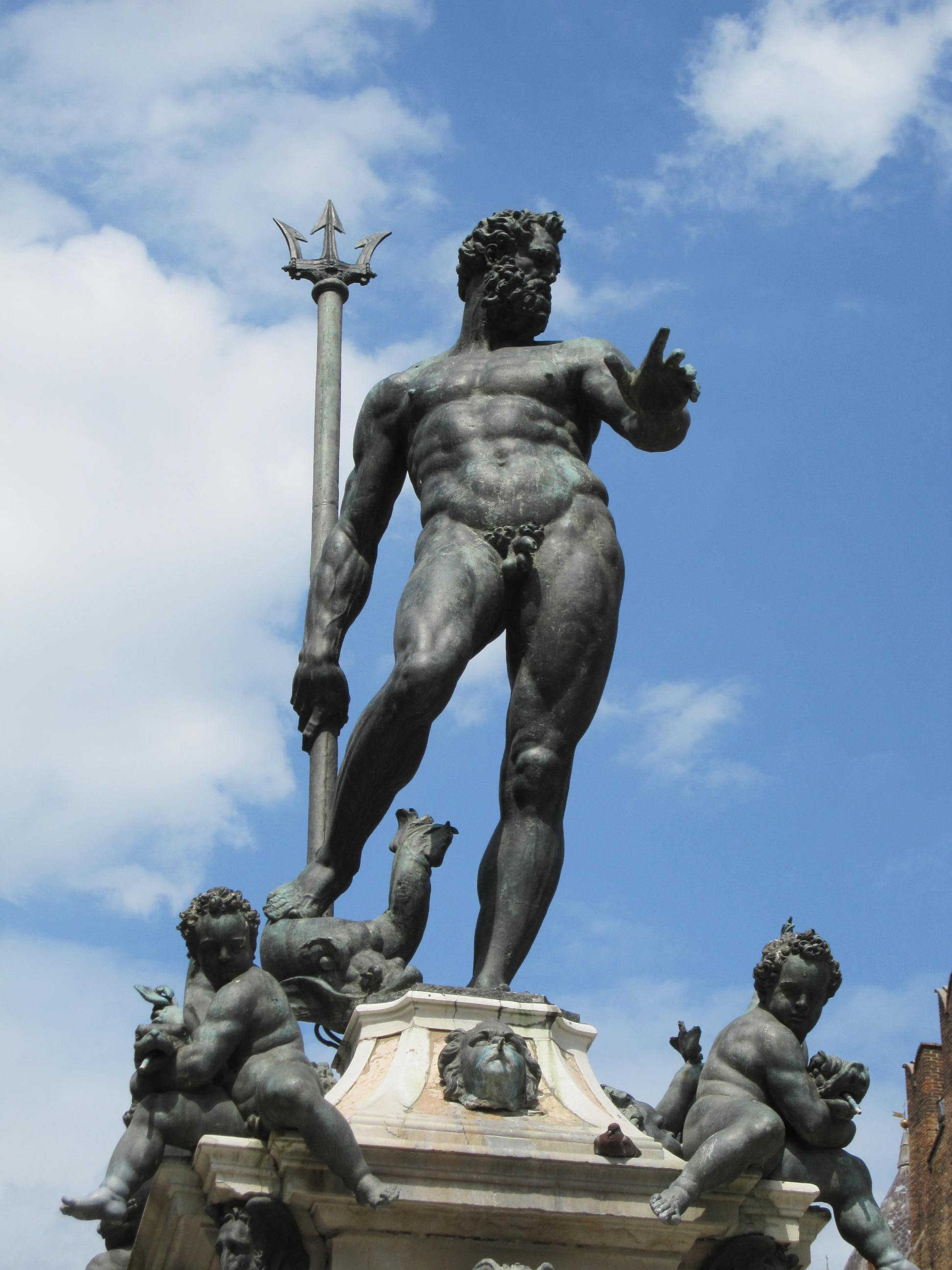 Fontana del Nettuno - MIBAC This is a photo of a monument which is part of cultural heritage of Italy.